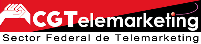 Sector Federal de Telemarketing de CGT